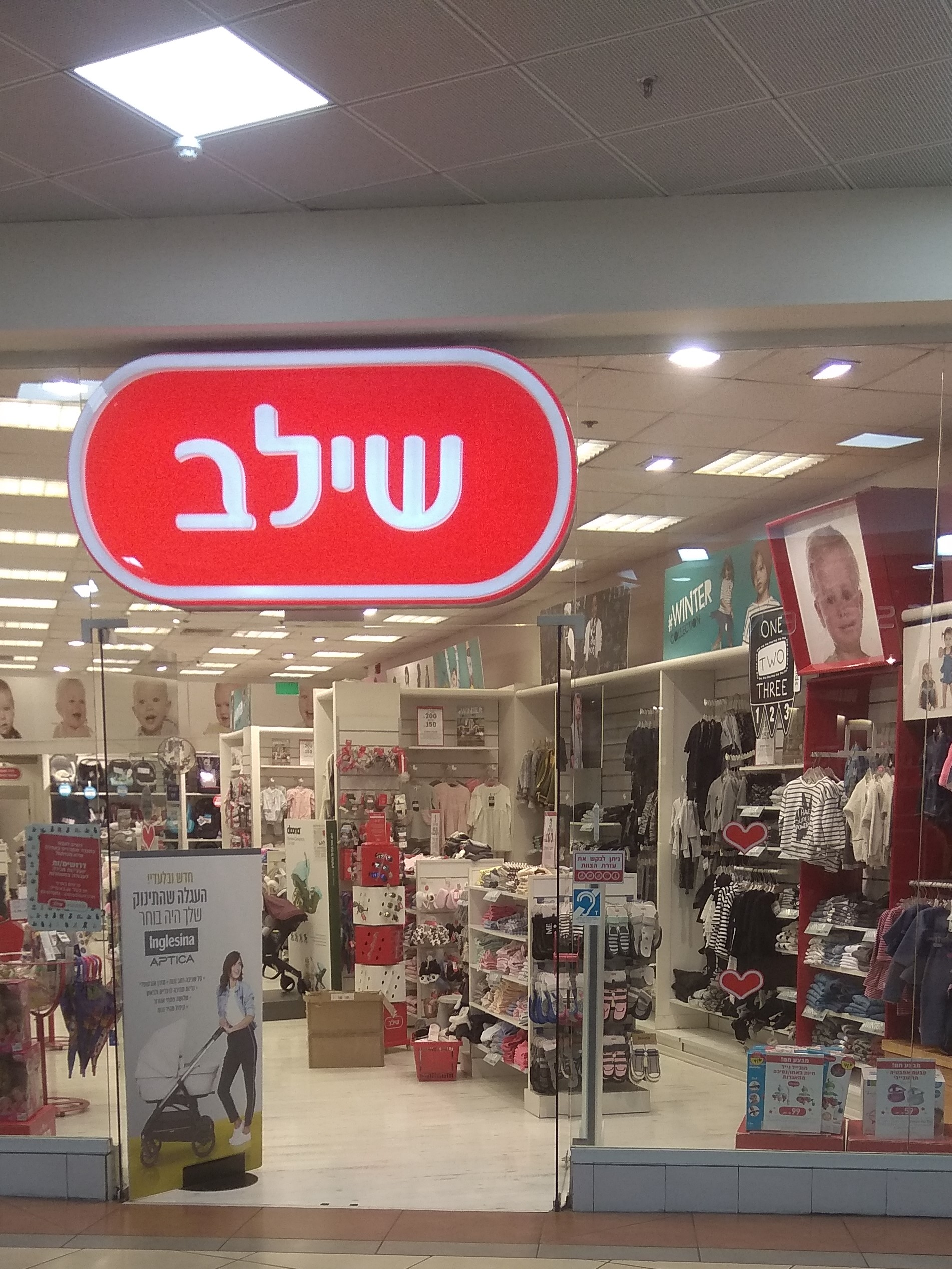 סניף רשת שילב